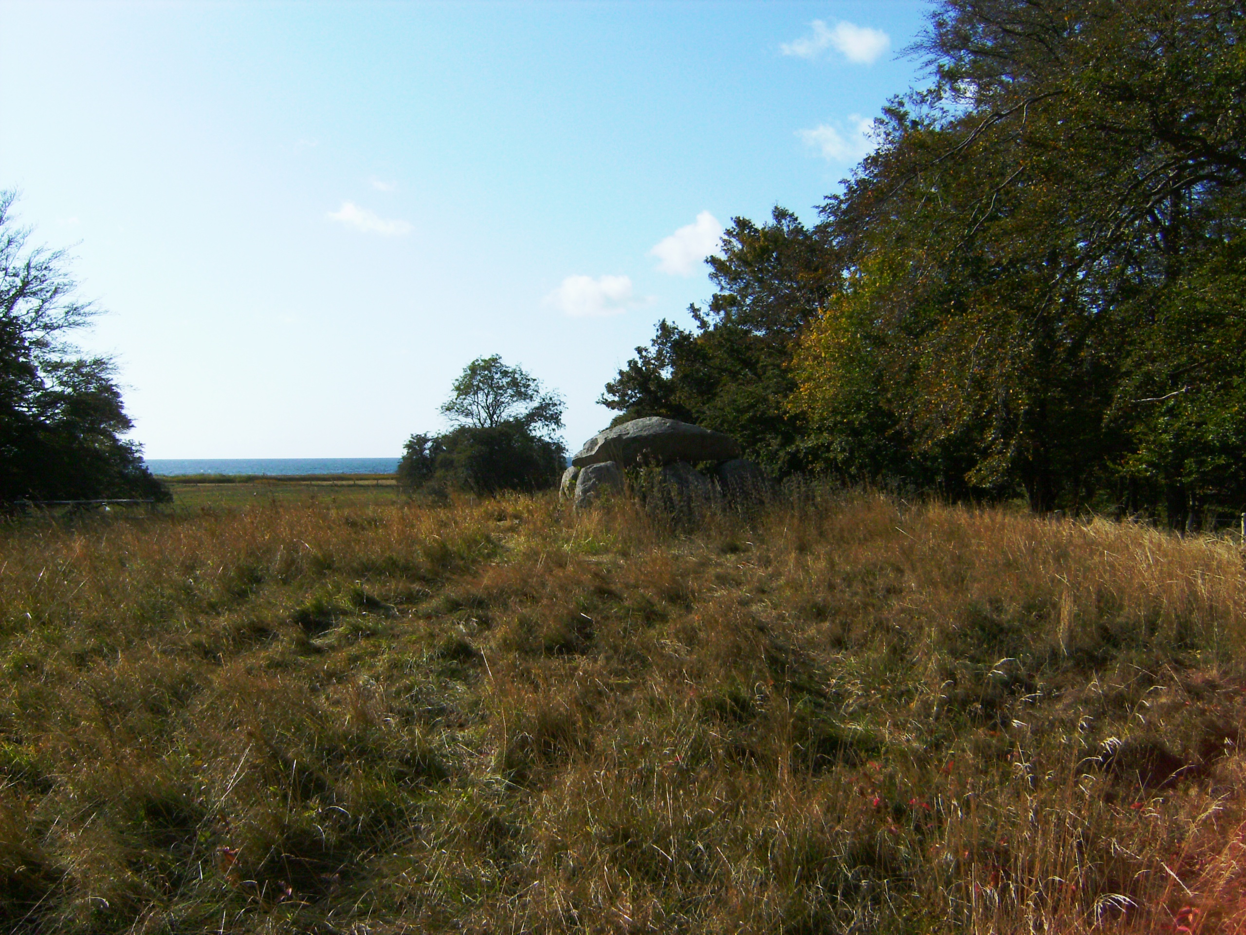 Oldtidsgrave i Ålholm Hestehave vest for Nysted Dolmens west of Nysted, Denmark